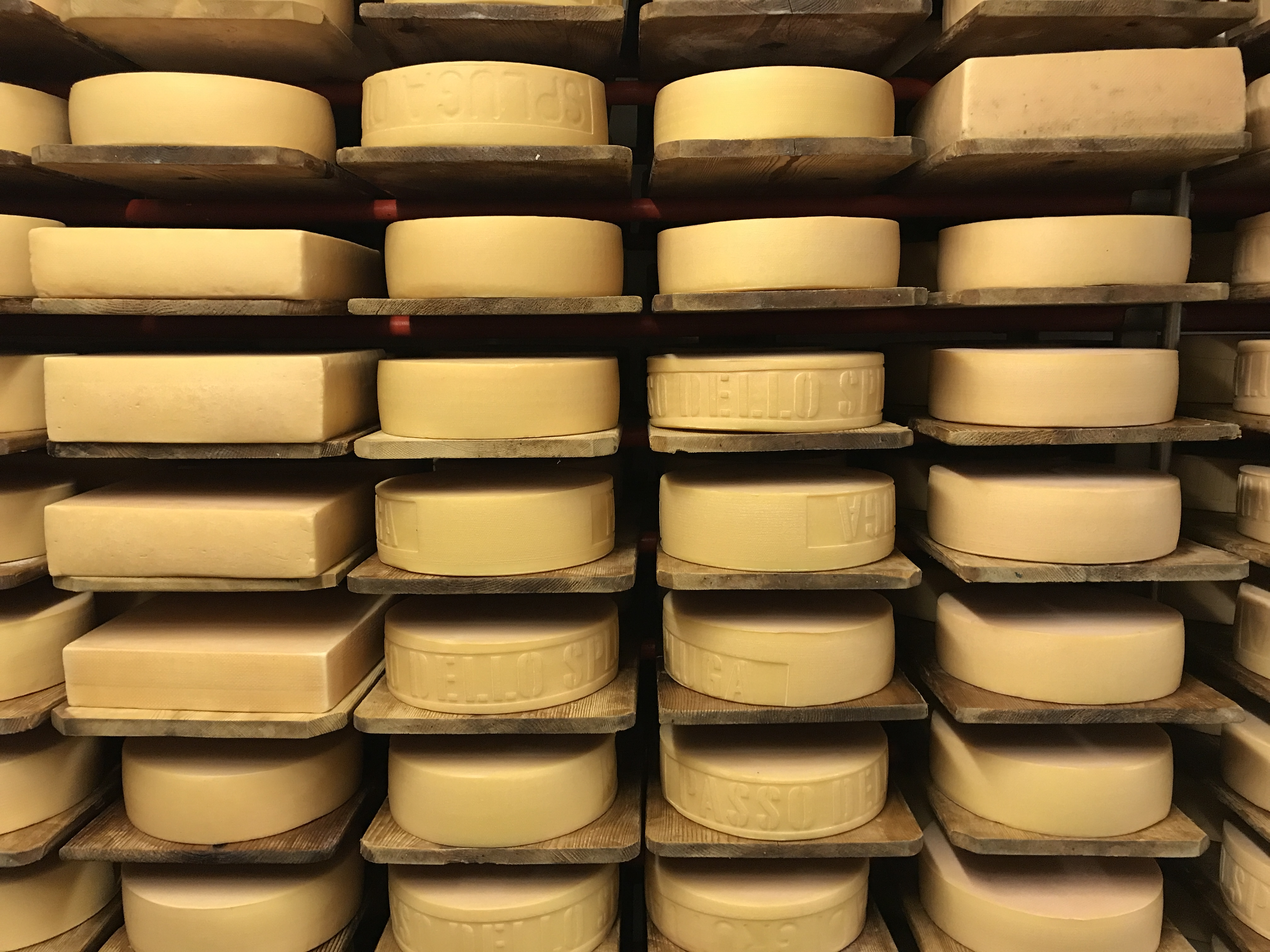 Käsekeller in Splügen GR